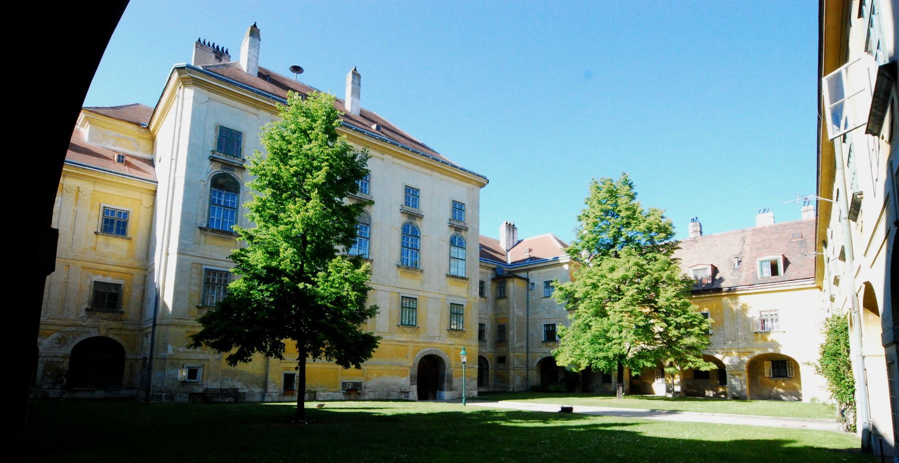 Im Hof von Schloss Mannersdorf am Leithagebirge in Niederösterreich